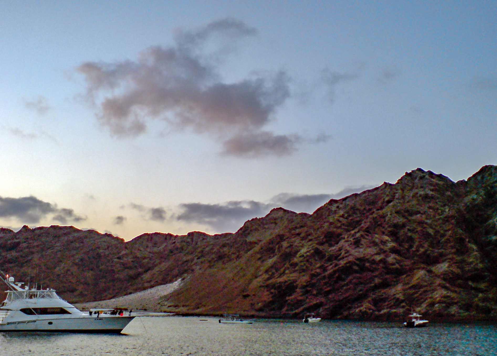 كوريا موريا